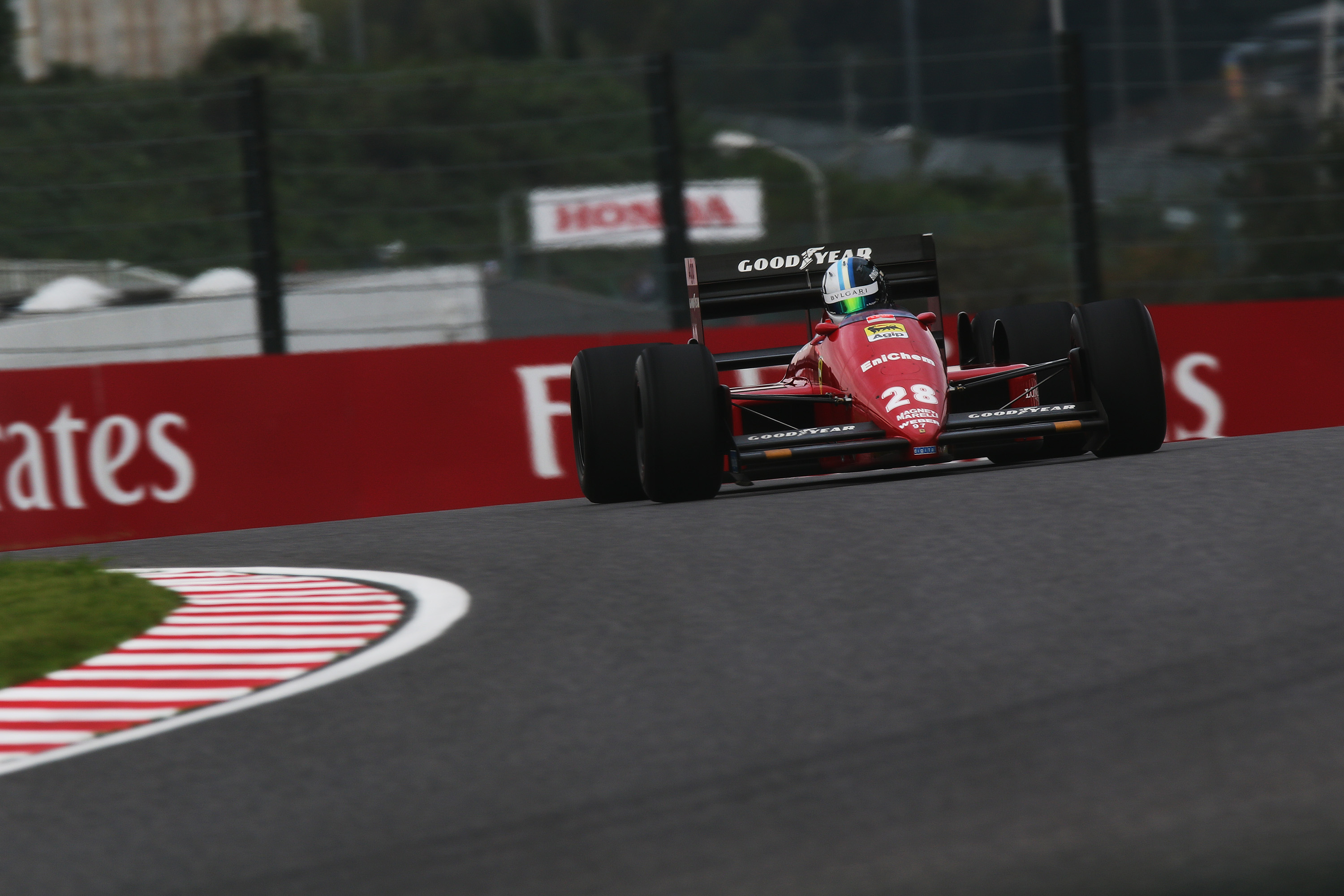 Gerhard Berger Ferrari F1 87 2018 Japanese Grand Prix.